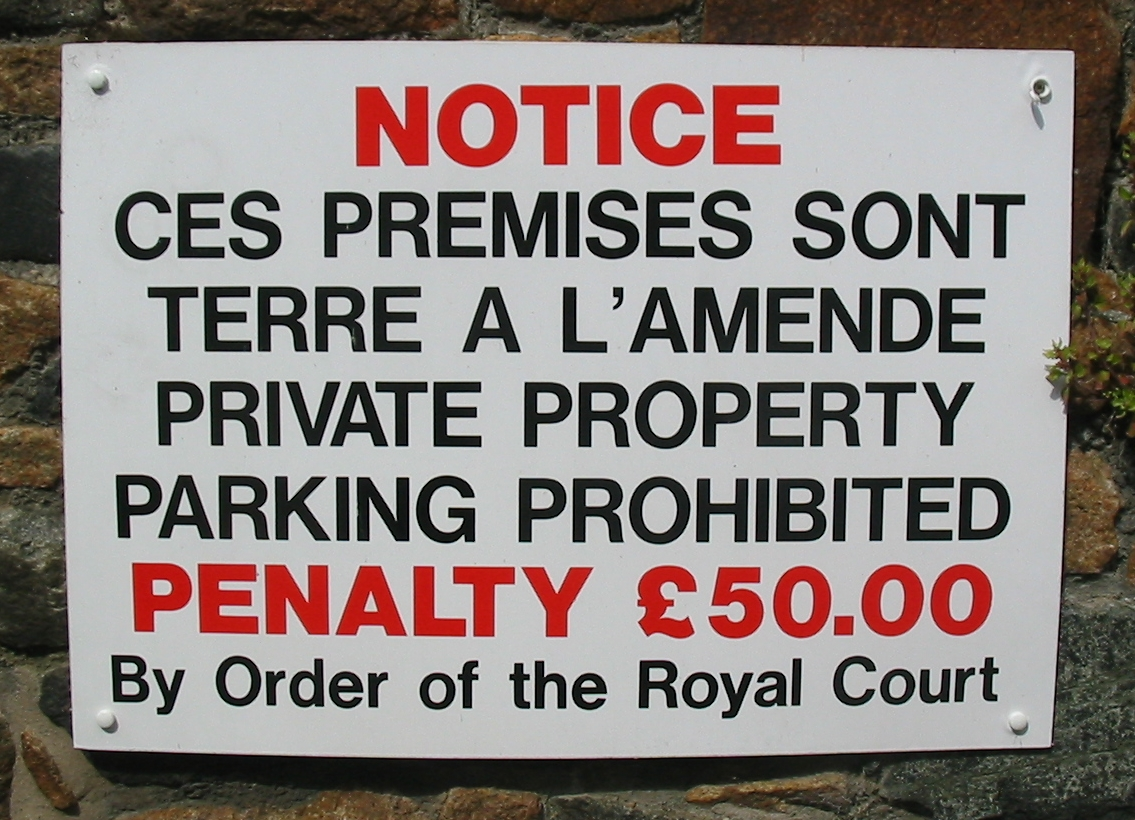 Parking sign in Guernsey